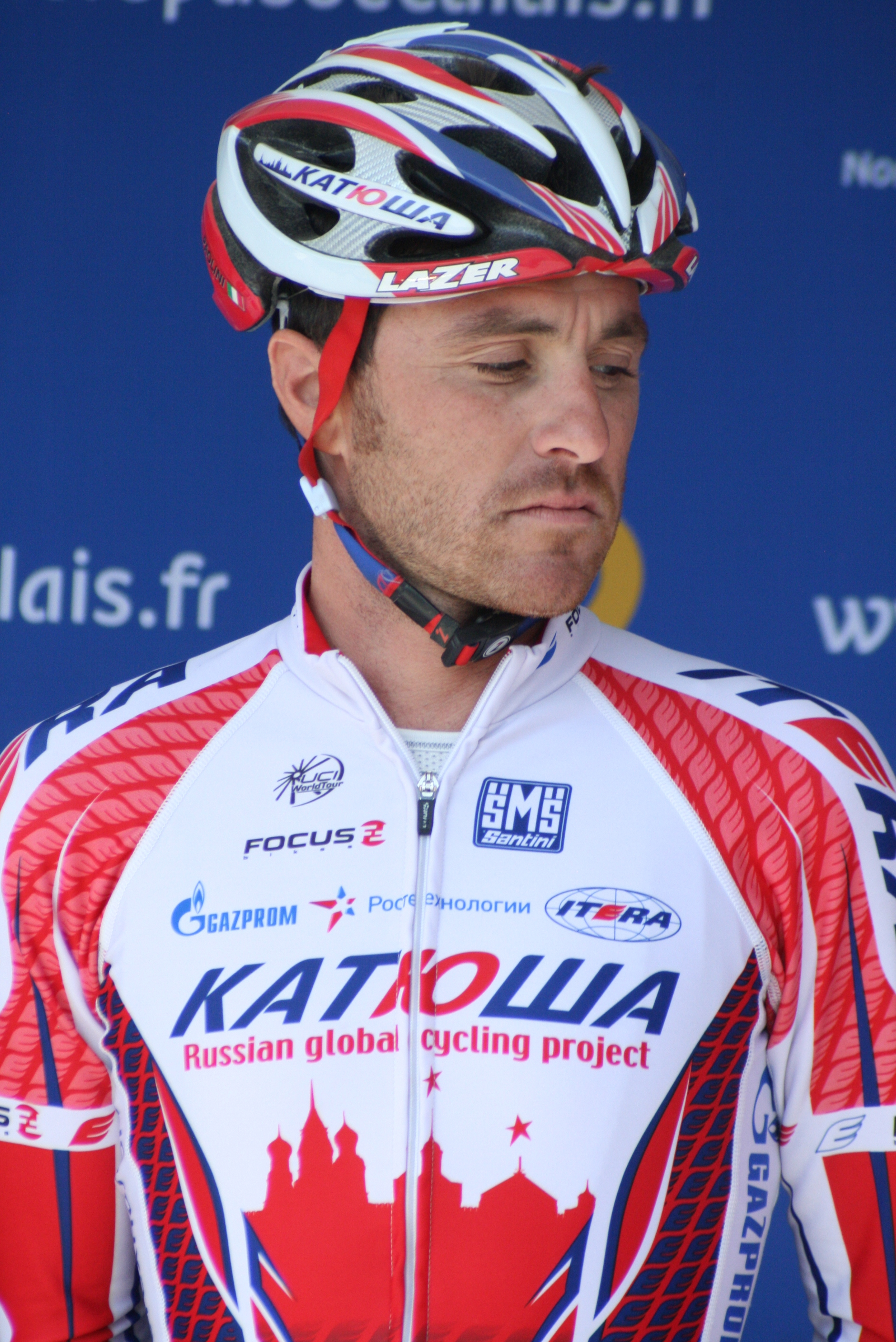 Présentation des coureurs au départ de la première étape Luca Paolini